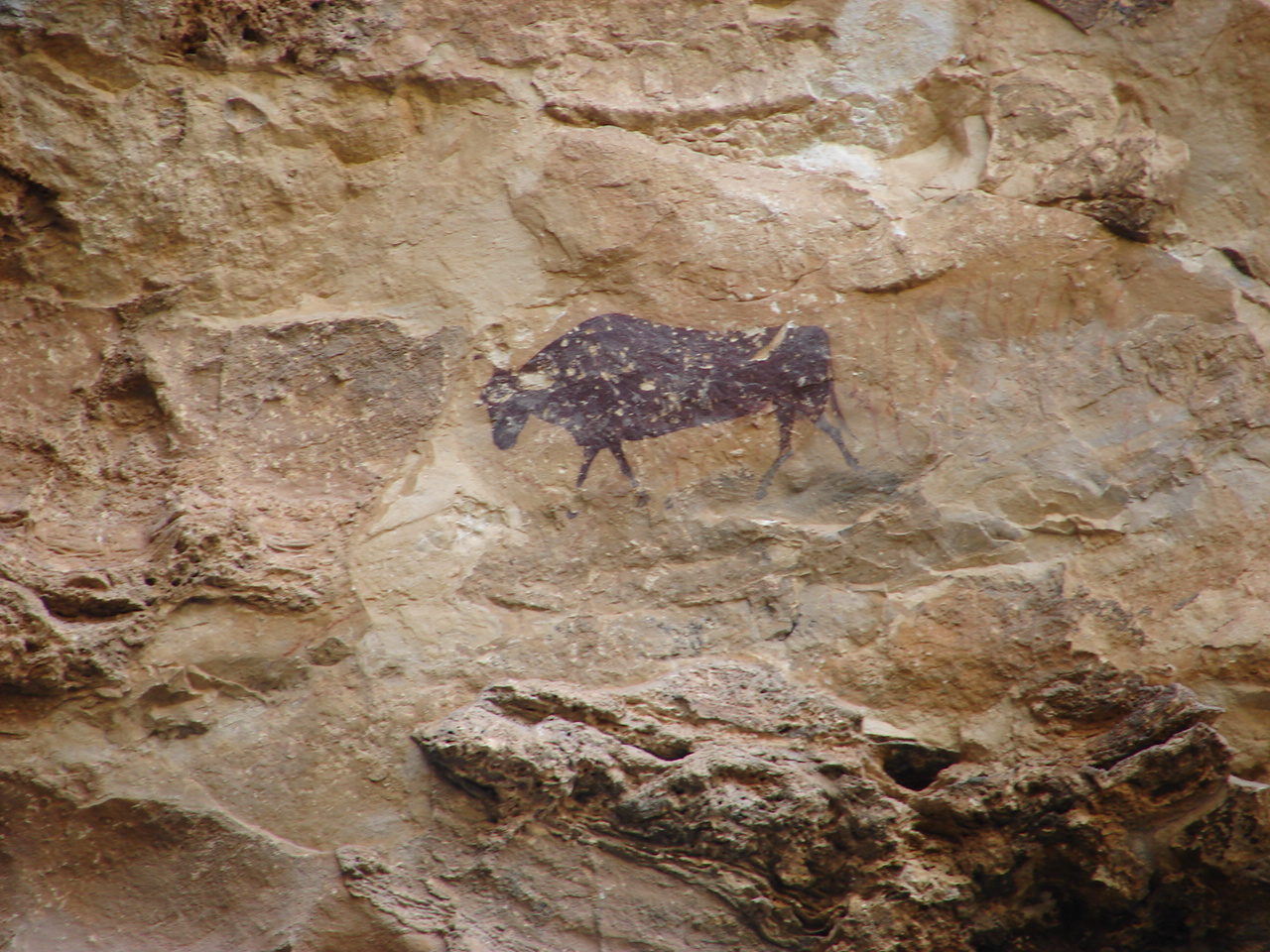 pintura levantina de un toro de 14 cm de longuitud localizada en Ladruñan (Teruel) Spain